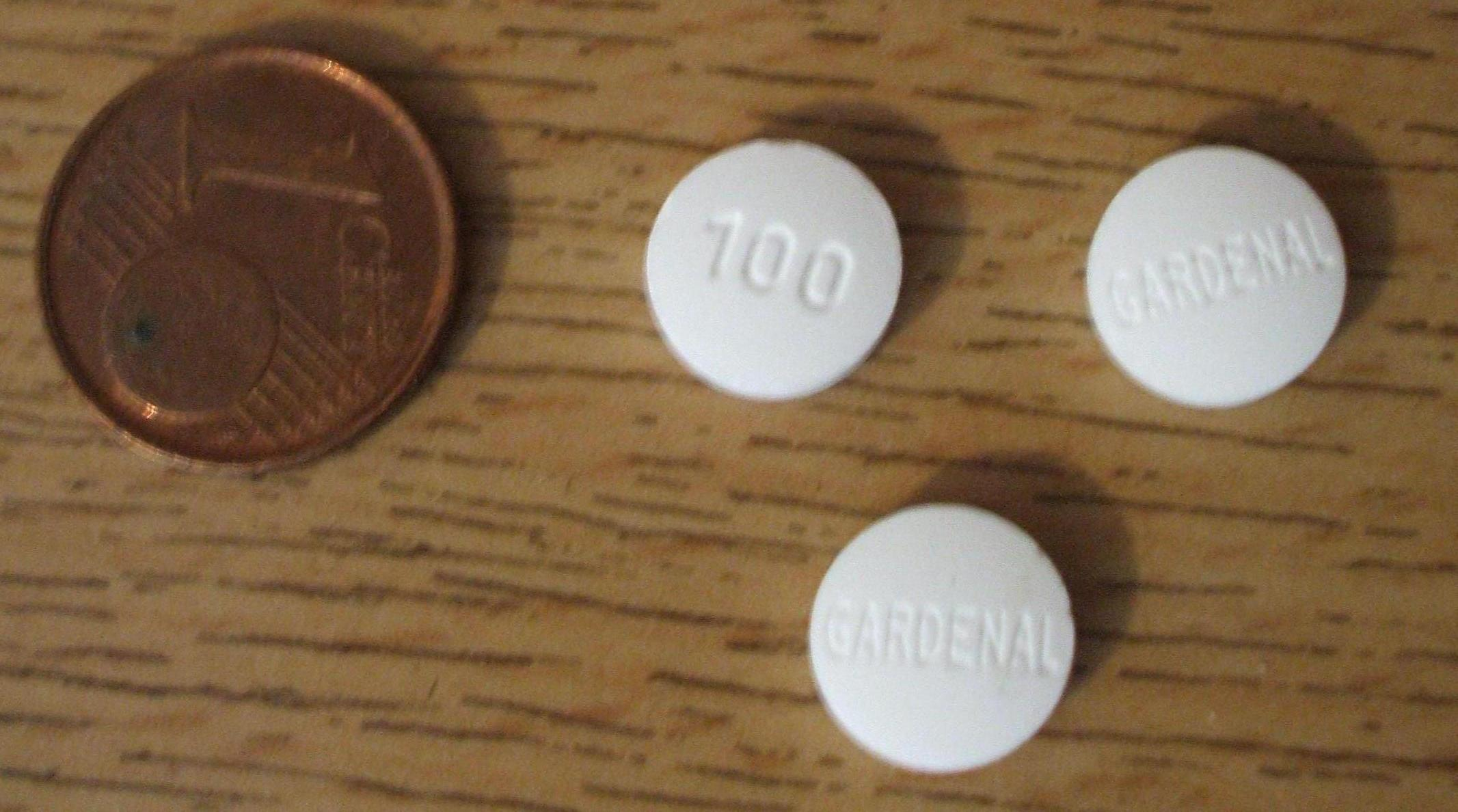 medicament gardenal